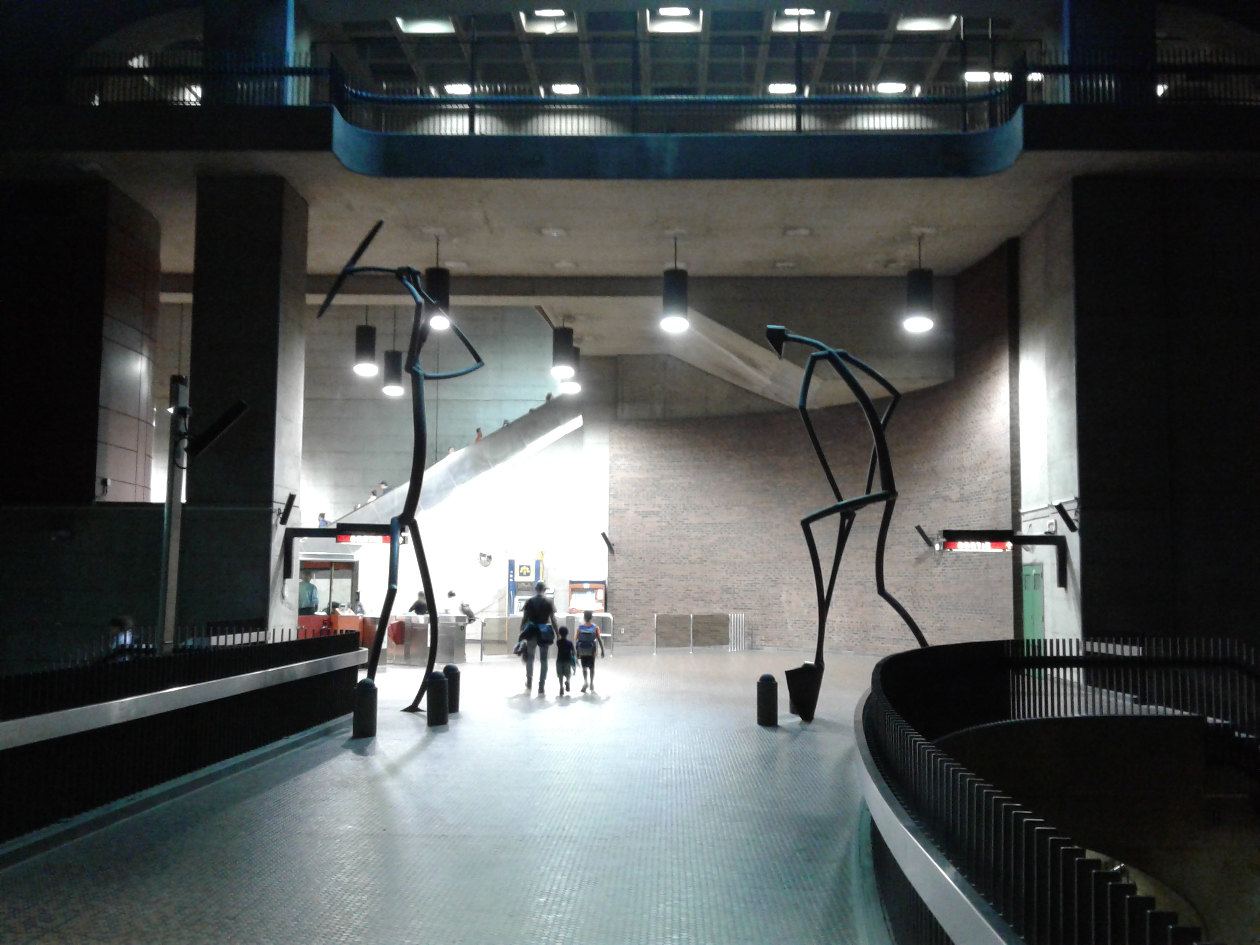 Pic et Pelle, sculpture réalisée par Germain Bergeron en 1976, située à l'intérieur de la station de métro Monk, à Montréal